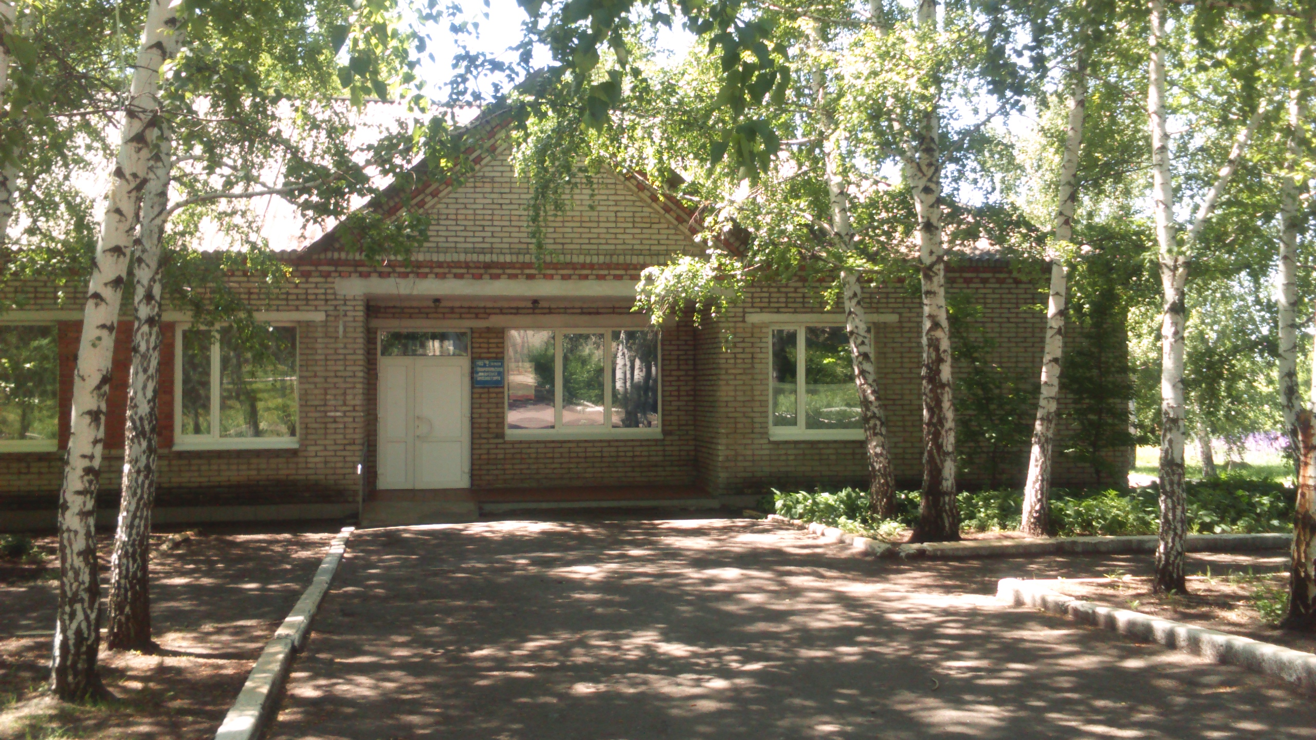 Добропі́лля — село в Україні, Добропільському районі Донецької області, над річкою Водяна.